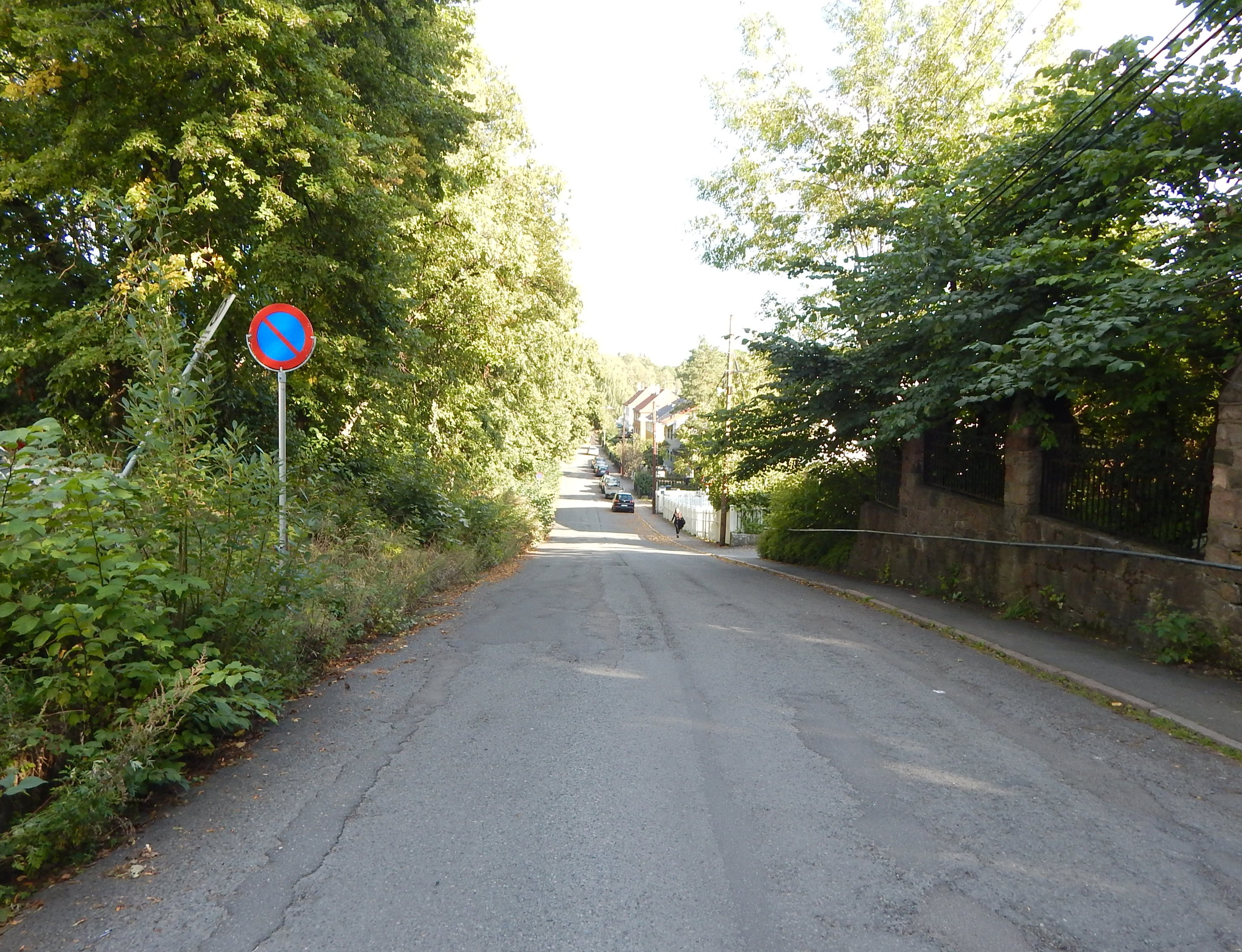 Rasmus Winderens vei mot Blindern